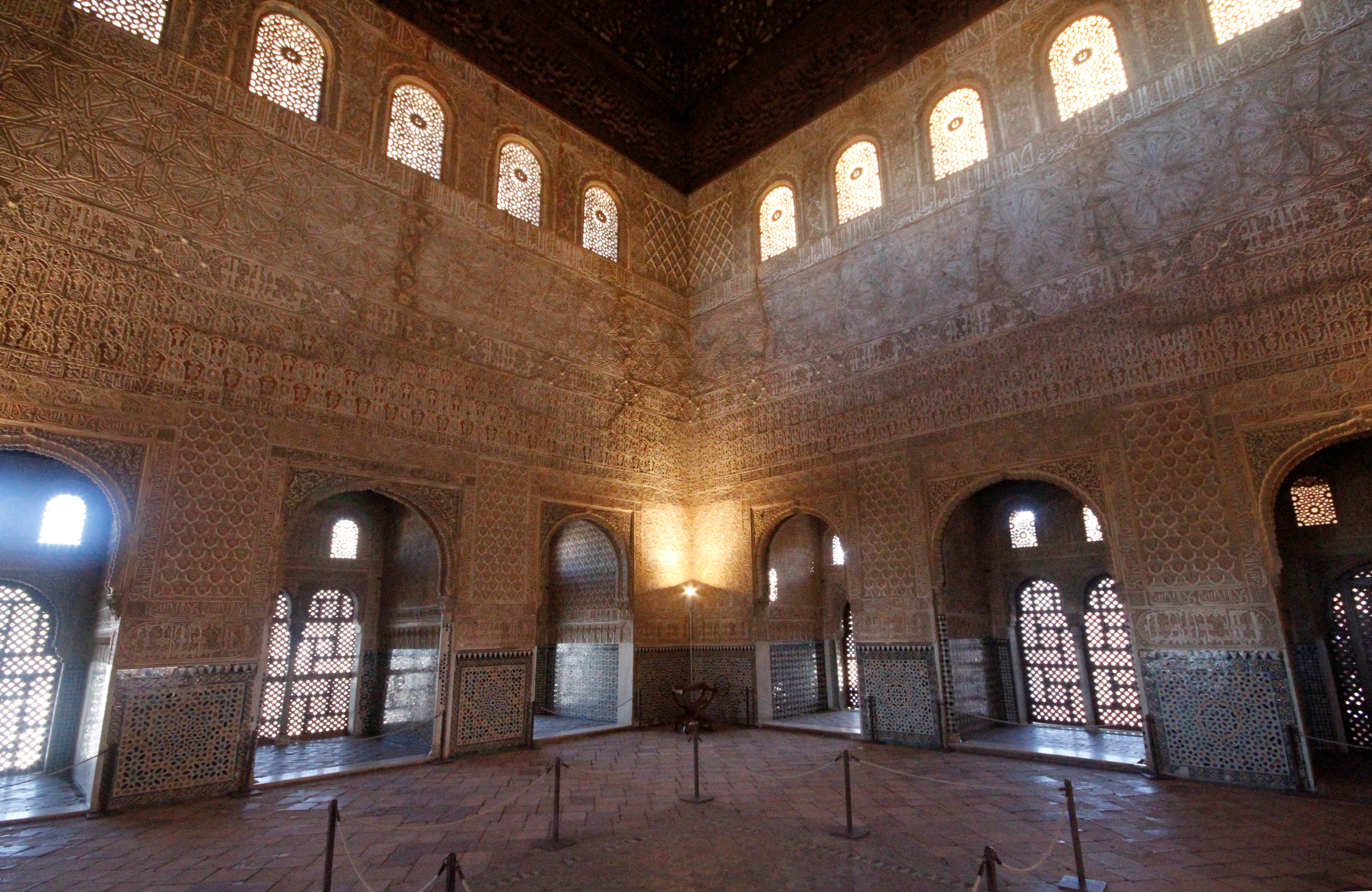 Salão dos Embaixadores